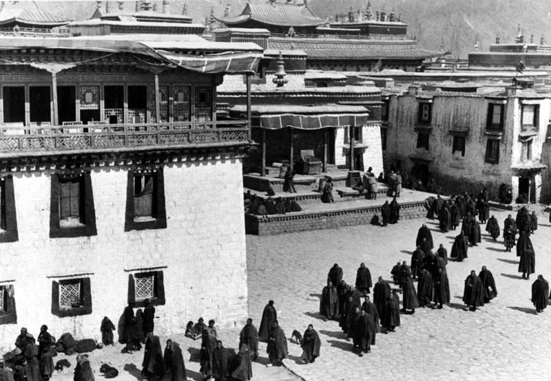 Lhasa, vor dem Stadttempel